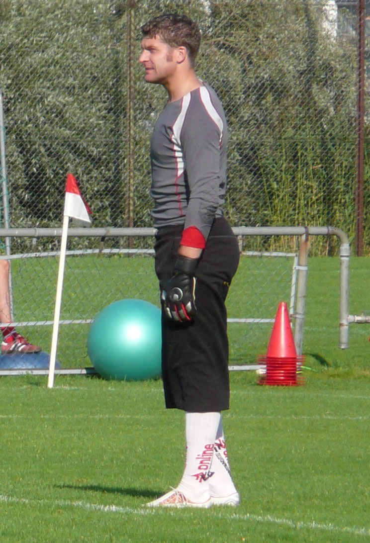 Petter Wastå